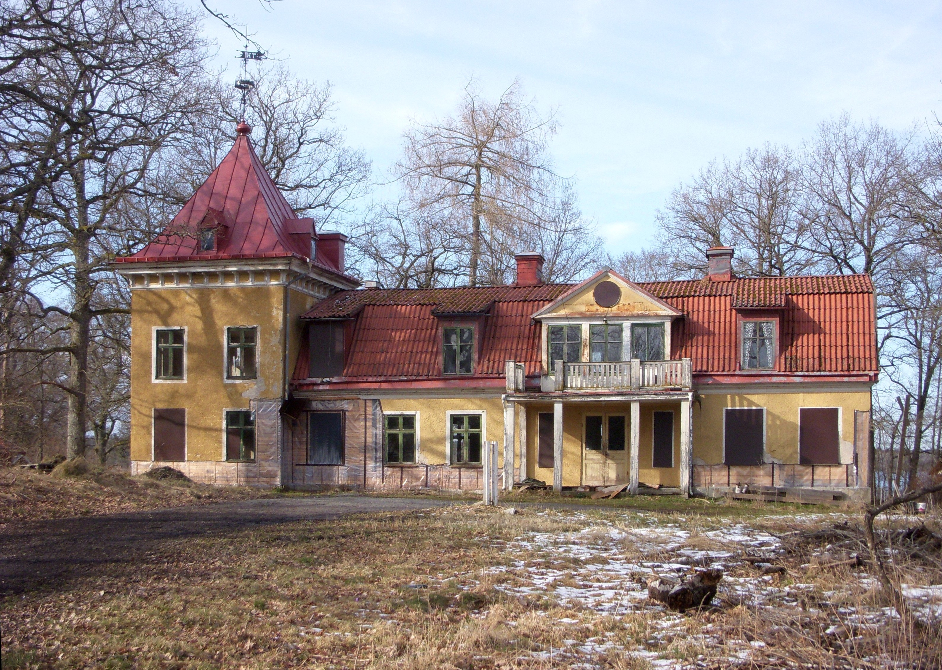 Björksättra gård, huvudfasad